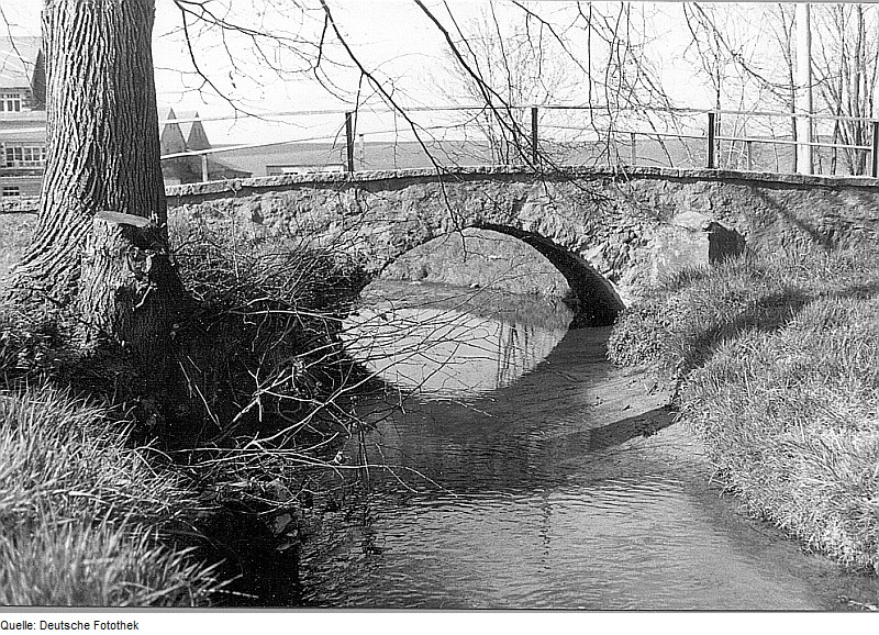 Original image description from the Deutsche FotothekPanschwitz-Kuckau-Ostro. Alte Brücke über das Klosterwasser bei der Mühle